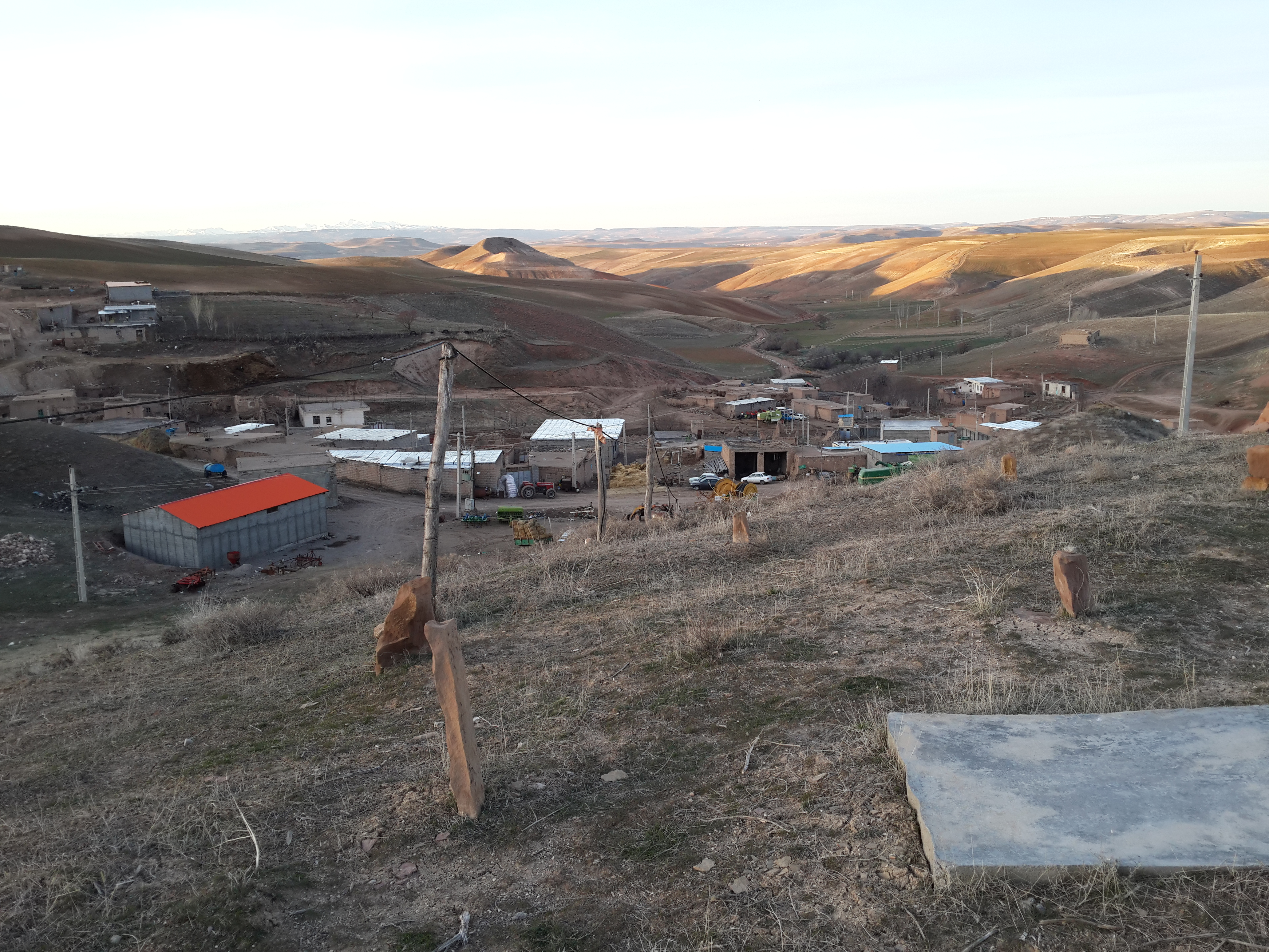 روستای قوپوز